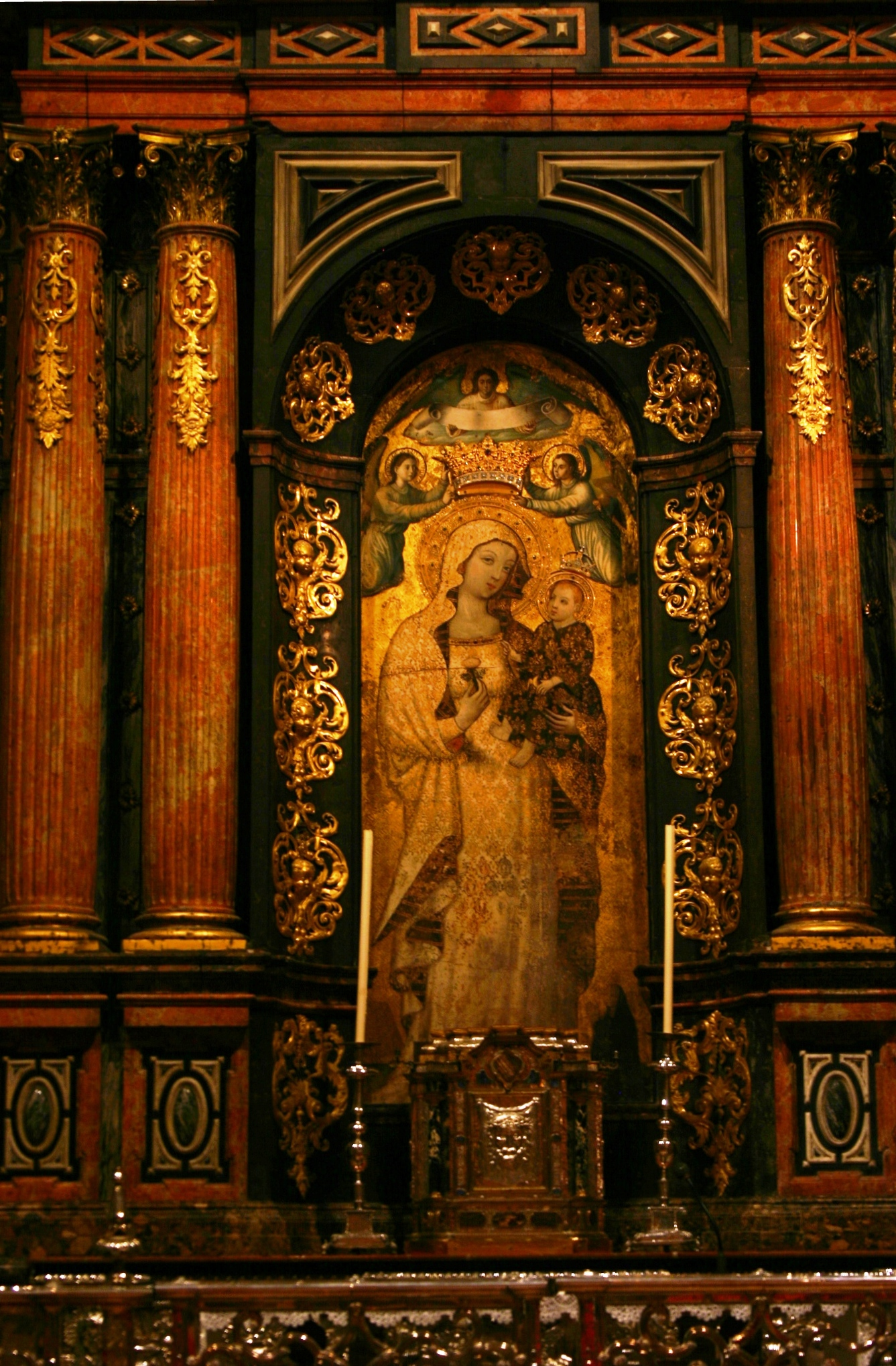 Imagen de la Virgen de la Antigua, de finales del siglo XIV, en el retablo de la capilla de la Virgen de la Antigua de la catedral de Sevilla, (España).